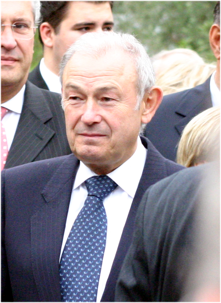 Günther Beckstein, deutscher Politiker (CSU), damaliger Bayerischer Innenminister und späterer Bayerischer Ministerpräsident.